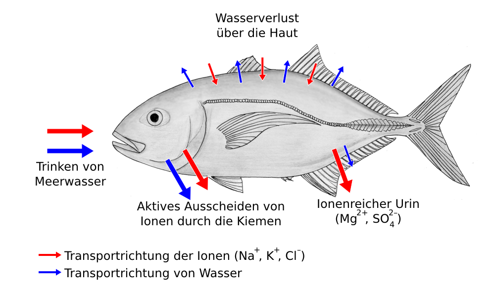 Osmoregulation